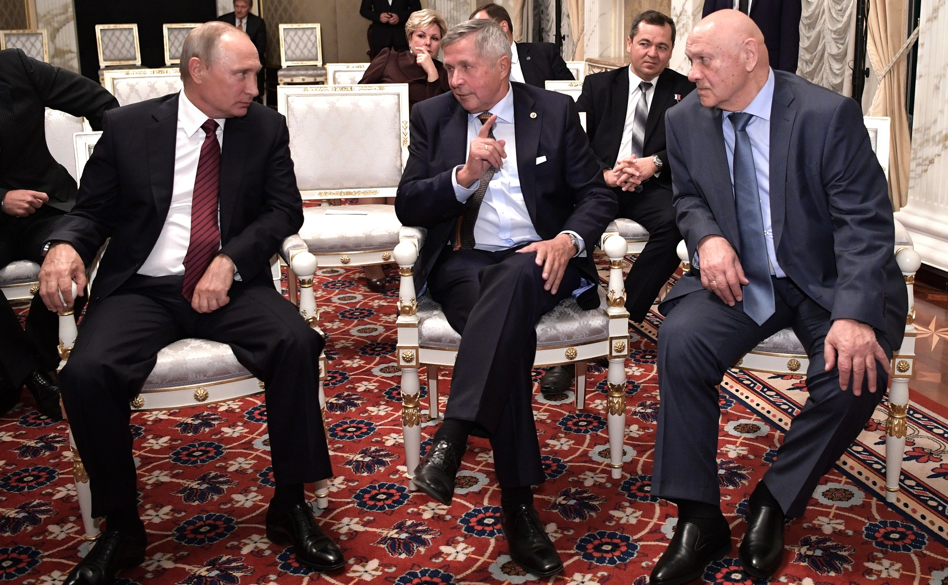 Встреча Президента России Владимира Путина со съёмочной группой фильма «Салют-7». С космонавтами – участниками экспедиции 1985 года Владимиром Джанибековым (справа) и Виктором Савиных